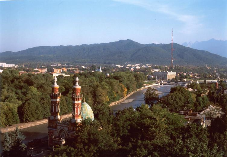 Object: Panorama of Vladikavkaz Description: Simbol of Vladikavkaz